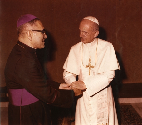 Monseñor Romero junto al papa Pablo VI. Aproximadamente un año antes de la muerte del pontífice.